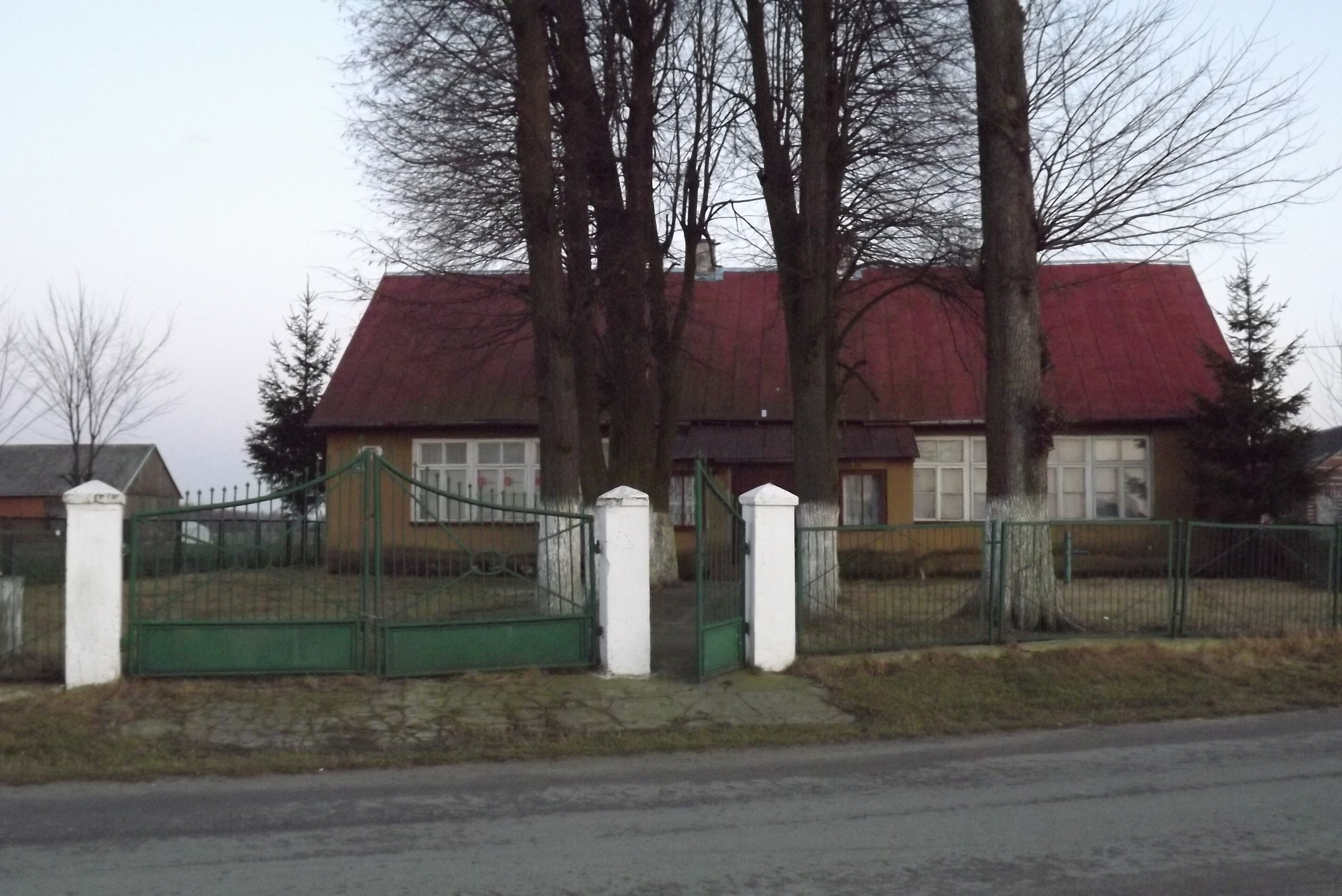 Siedziba Muzeum Regionalnego w Woli Osowińskiej, dawniej siedziba GOK-u, jeszcze wcześniej bo przed wojną siedziba Szkoły Podstawowej